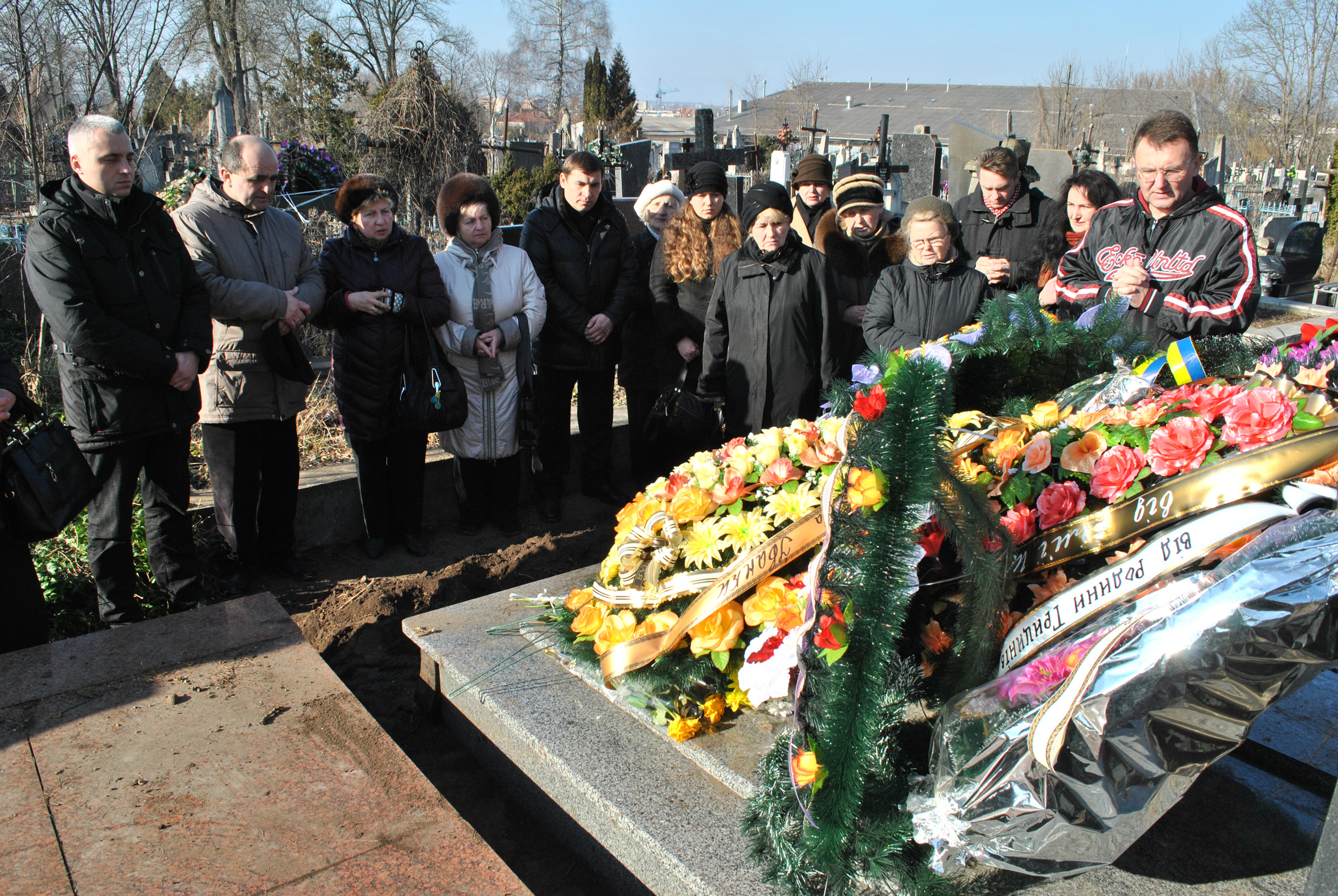 Похорон українського архівіста, краєзнавця, членкині ВУСК, уродженки м. Тернополя, авторки книги «Тернопіль у плині літ» Любомири Степанівни Бойцун (м. Тернопіль, Микулинецьке кладовище, 6 березня 2015 року). Заупокійна молитва.